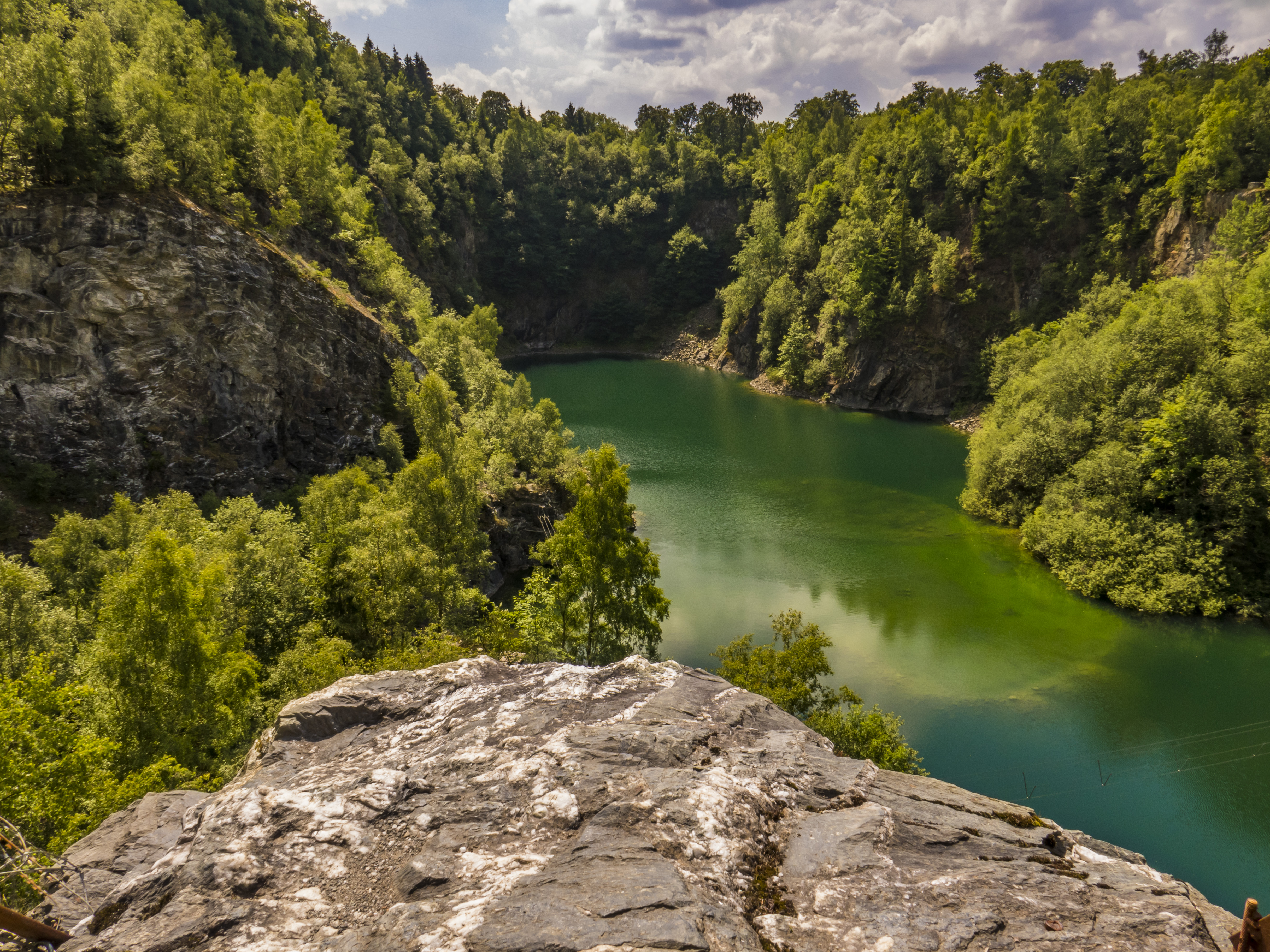 Ein Überbleibsel des Bergbaus in Siedlinghausen bei Winterberg ist der Bergsee des Meistersteins. Hier wurde früher Schiefer abgebaut, nach der Schließung des Bruchs hat sich durch Regenwasser ein 7 bis 9 m tiefer See gebildet. Das Gelände ist heute im Privatbesitz, der See wird aber zum Tauchen und die Steilwände zum Bergklettern genutzt.